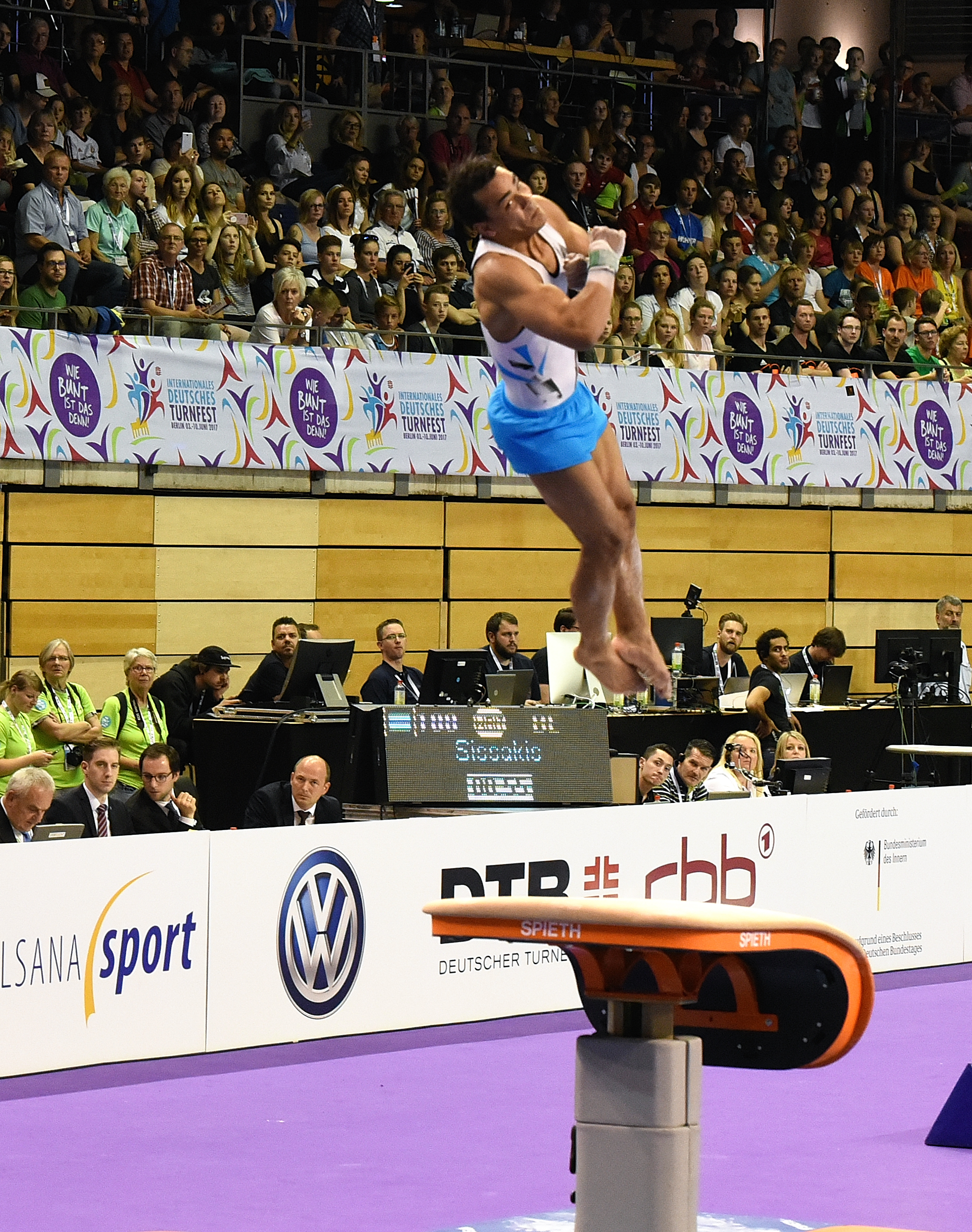 Deutsche Meisterschaften Gerätturnen Mehrkampf männlich Wettkampf beim Internationalen Deutschen Turnfest Berlin 2017. Abgebildet: Matthias Fahrig.